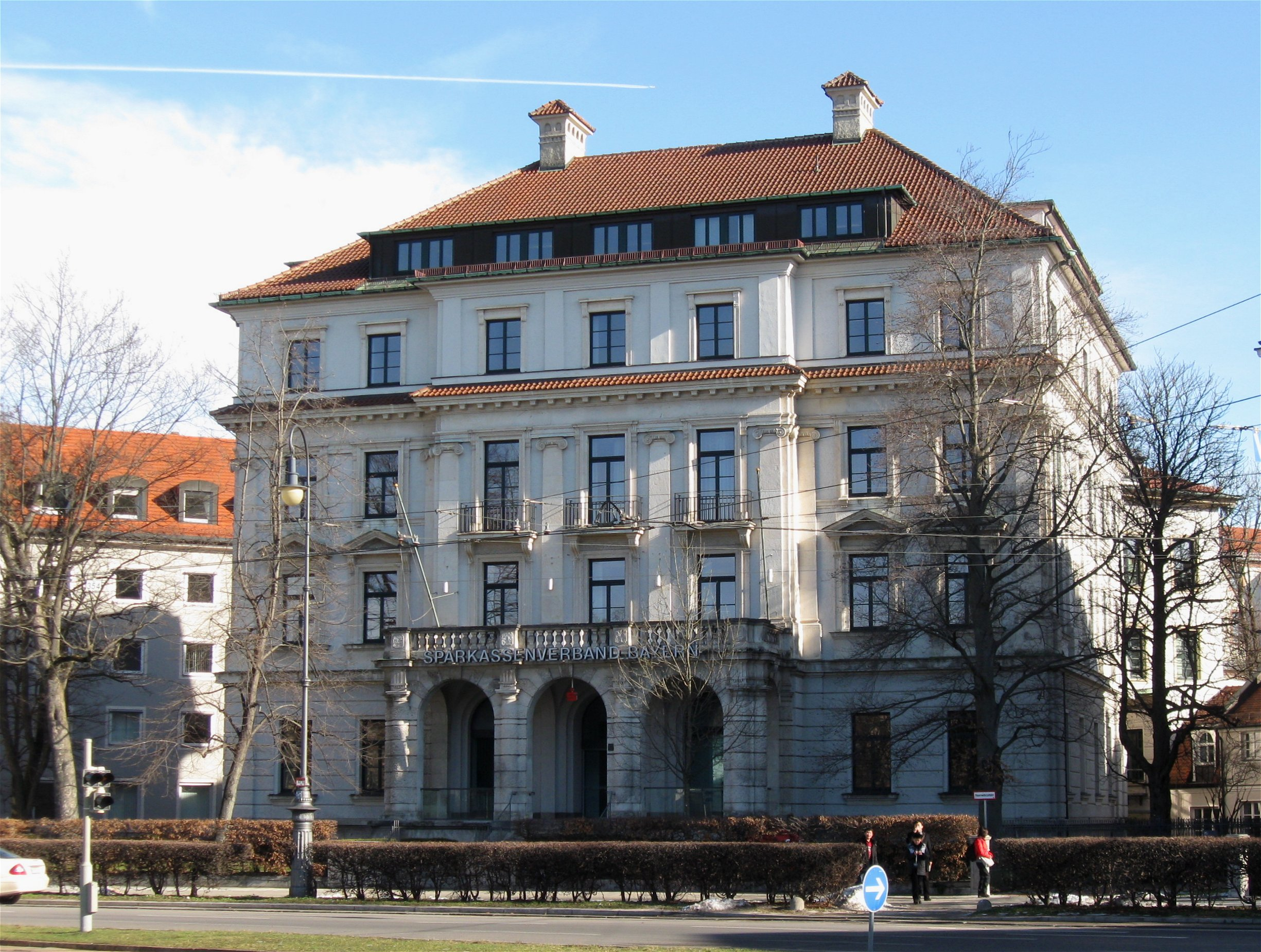 Karolinenplatz 5; Ehem. Palais, jetzt Sparkassenverband Bayern, in klassizistischen Neurenaissanceformen, 1895/96 von Ludwig Deiglmayr sen.